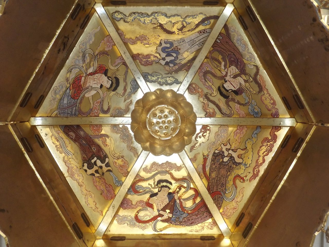 神恵院の天蓋の天女